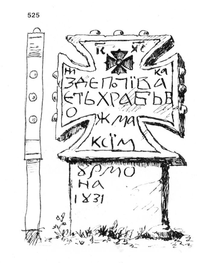 525. Надгробен кръст от бял пясъчник из двора на манастира „Св. Архангел Михаил" над гр. Трън. Четирикрилен; с по 3 ябълки на горните три крила. Рисунък точен. Дълбока гравировка. Дата 1831 г. Размери: 90x57x11 см. Скициран на 22.VШ.1930 г. (Т. 13, обр. 40.)